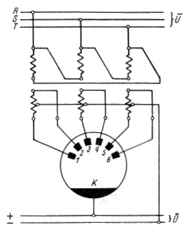 Schaltskizze eines Quecksilberdampfgleichrichters mit sechs Anoden